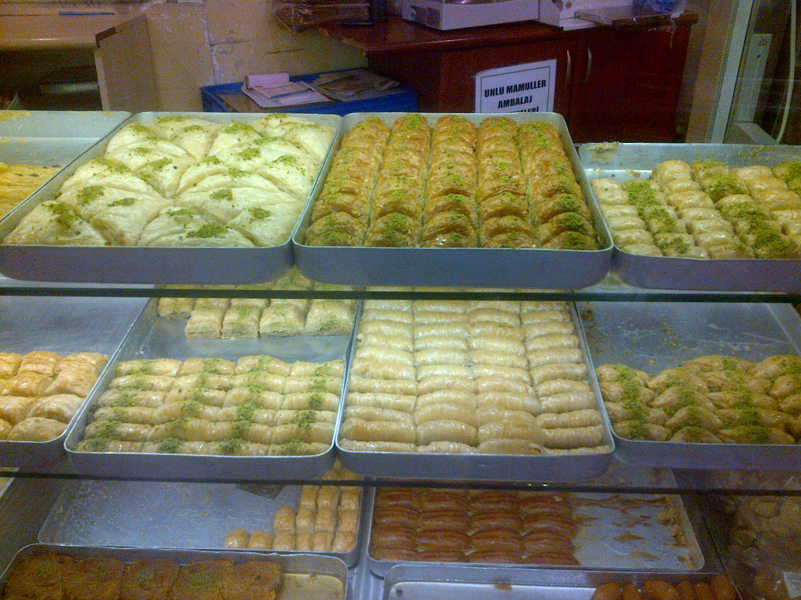 Postres turcos en la vitrina de un supermercado en Ankara:Baklava, şöbiyet, nuriye, badem, kalburabasma et al